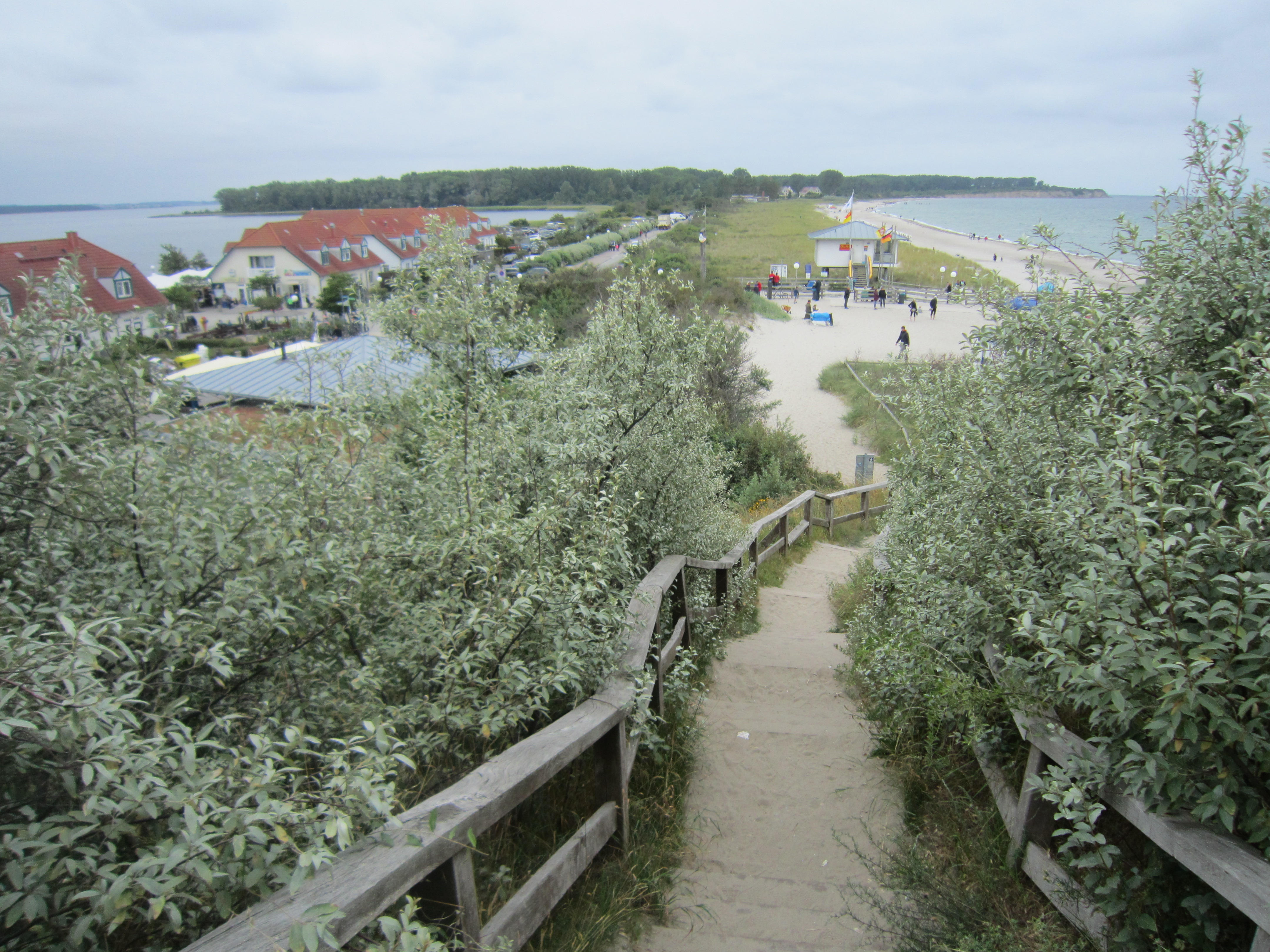 Blick vom slawischen Burgwall Schmiedeberg in Rerik über die Landenge in Richtung der Halbinsel Wustrow. Links zu sehen ist das Salzhaff, rechts die Ostsee.